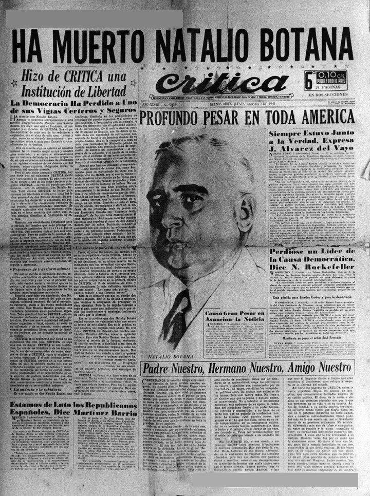 Portada del Diario Crítica del 8 de agosto de 1941